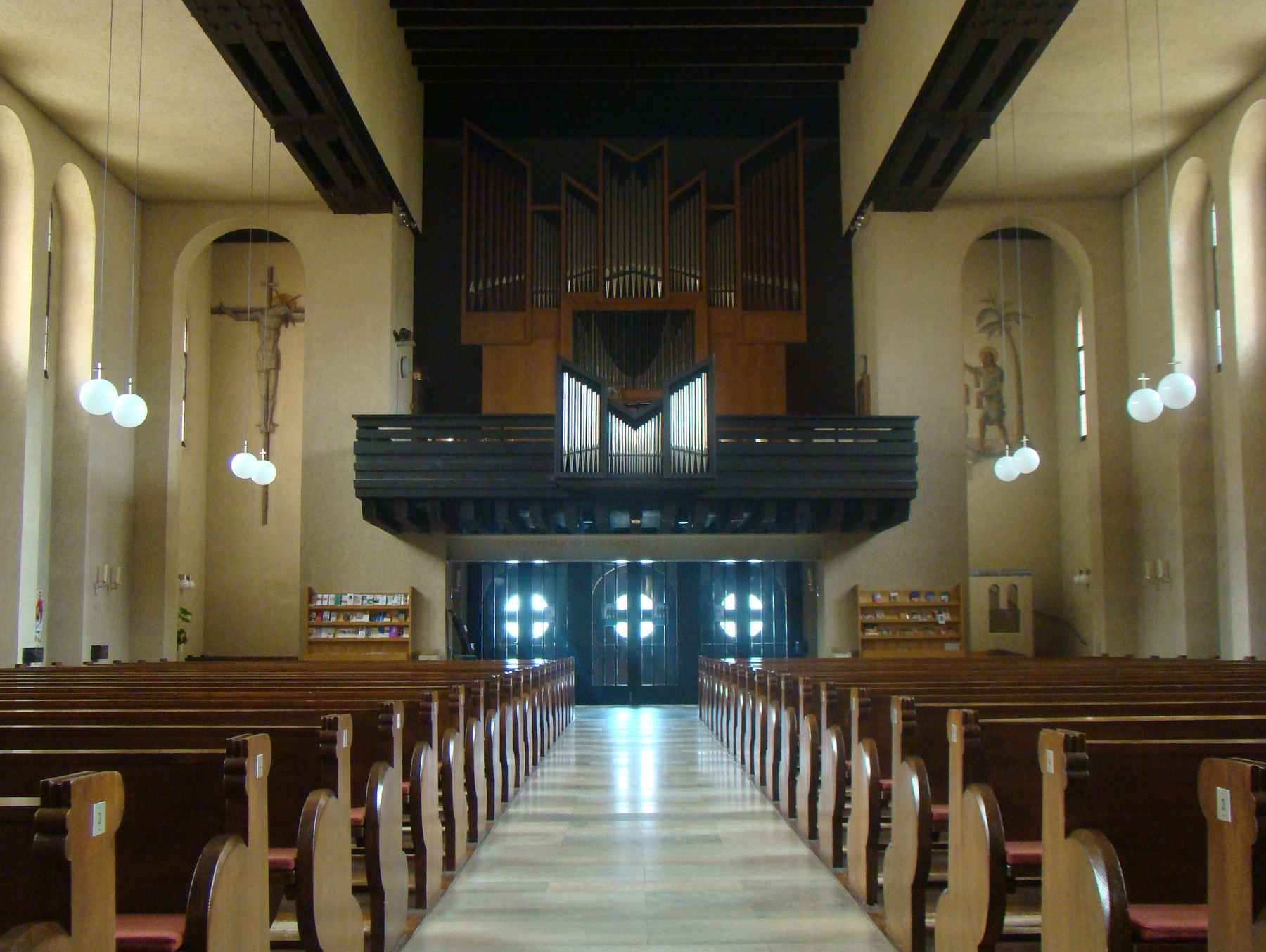 St. Cäcilia in Mosbach